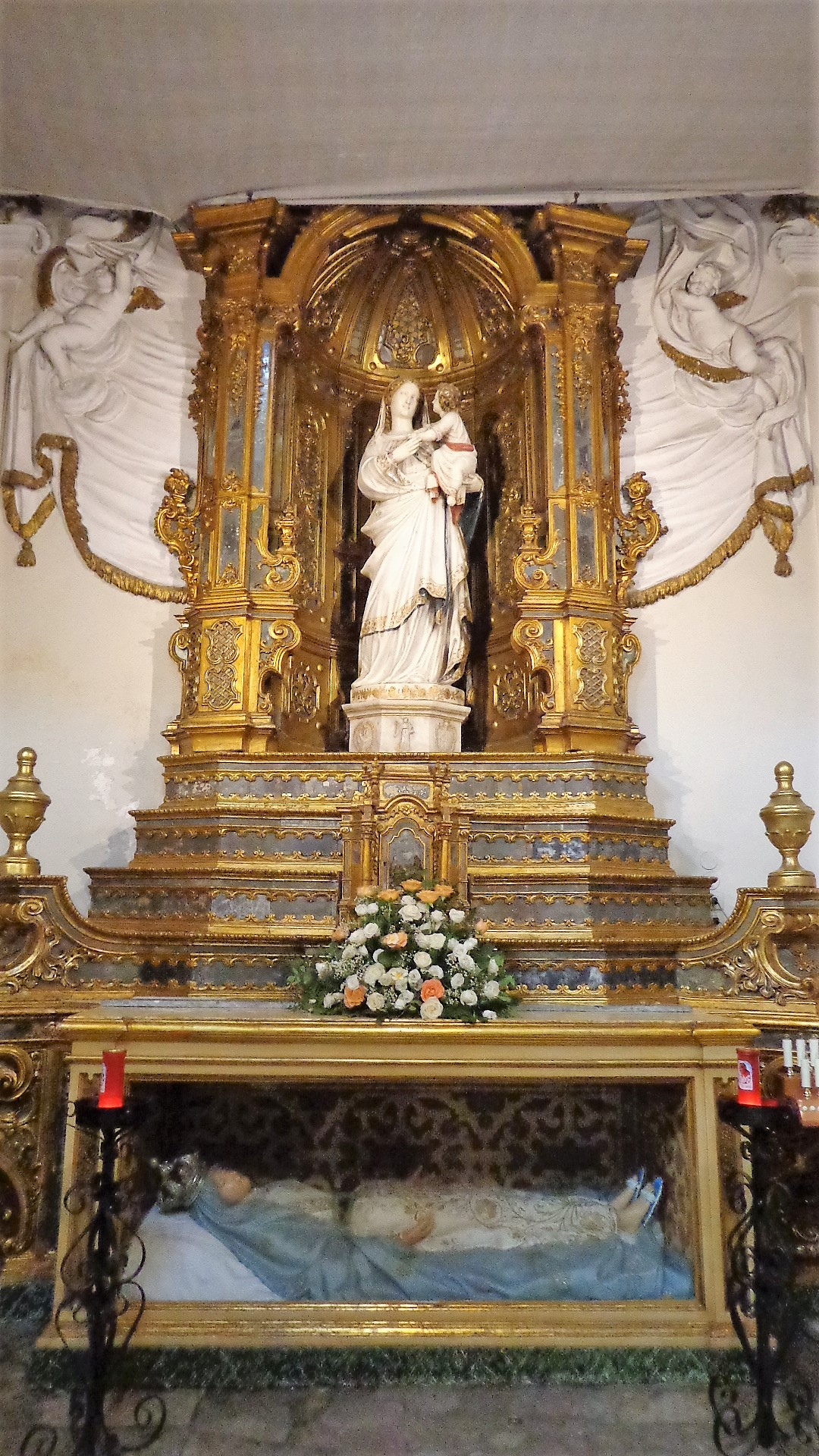 Altare della Vergine